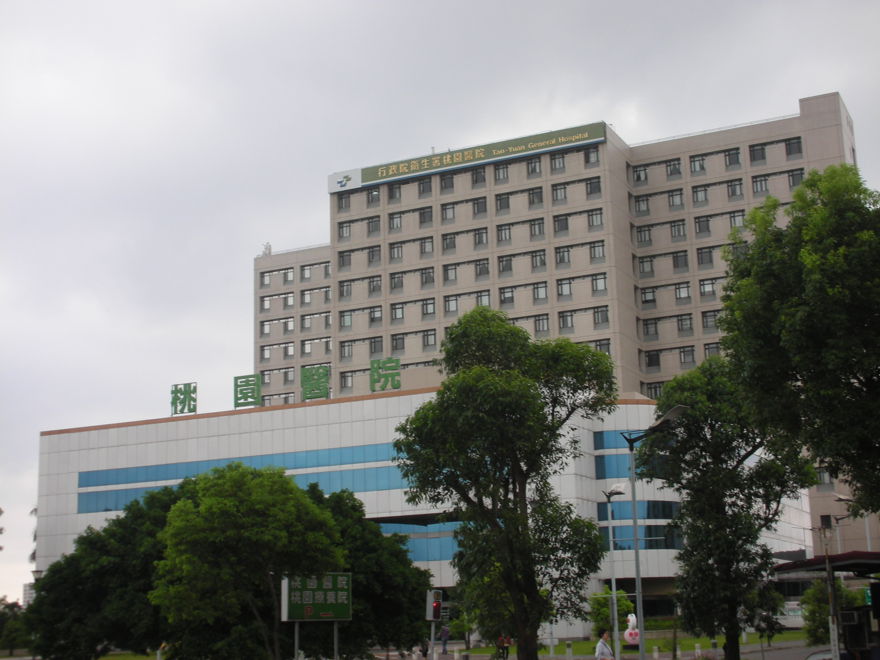 行政院衛生署桃園醫院，位於桃園縣中壢市。